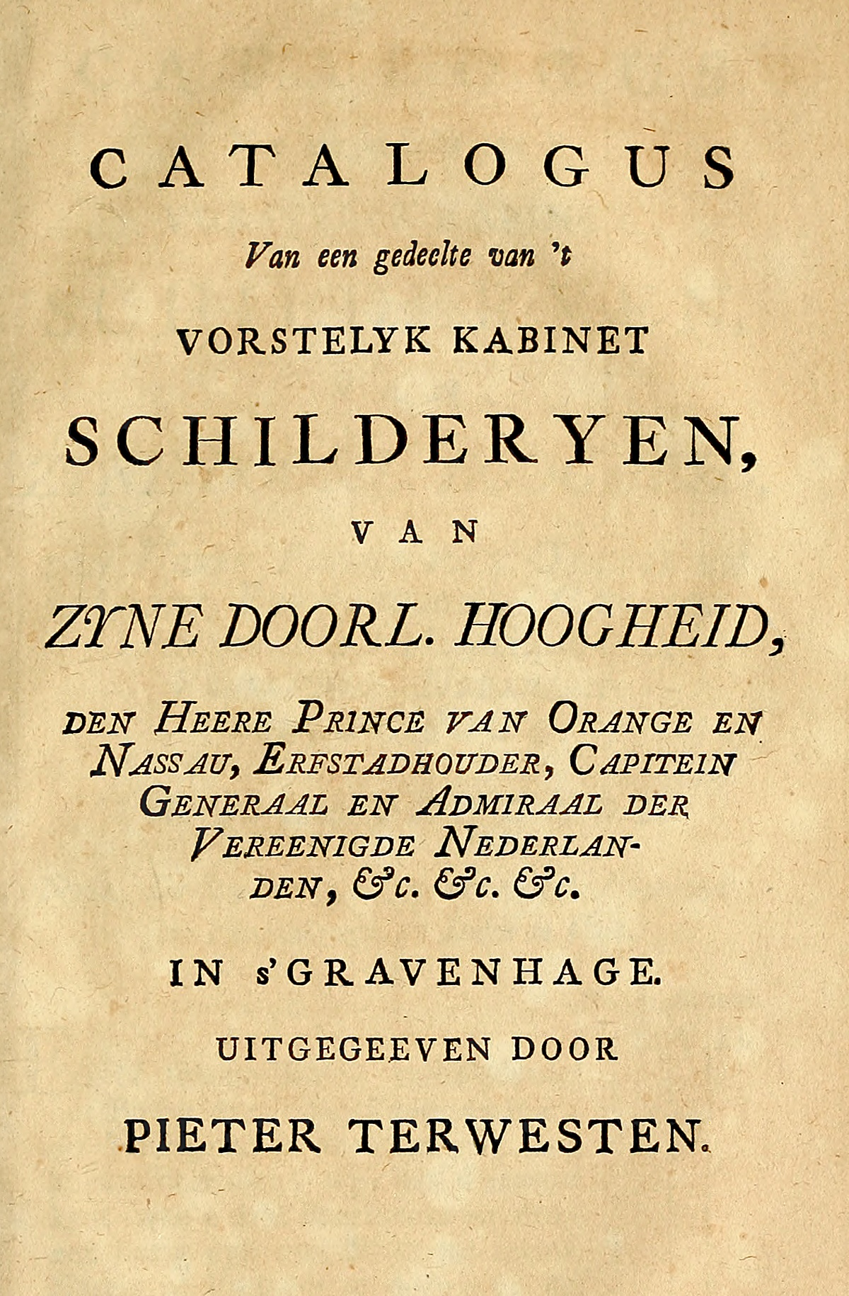 Catalogus of naamlyst van schilderyen met derzelver pryzen, zedert een langen reeks van jaaren zoo in Holland als op andere plaatzen in het openbaar verkogt, benevens een verzameling van lysten van verscheyden nog in wezen zynde cabinetten. Uitgeverij Johannes Gaillard, Den Haag, 1770